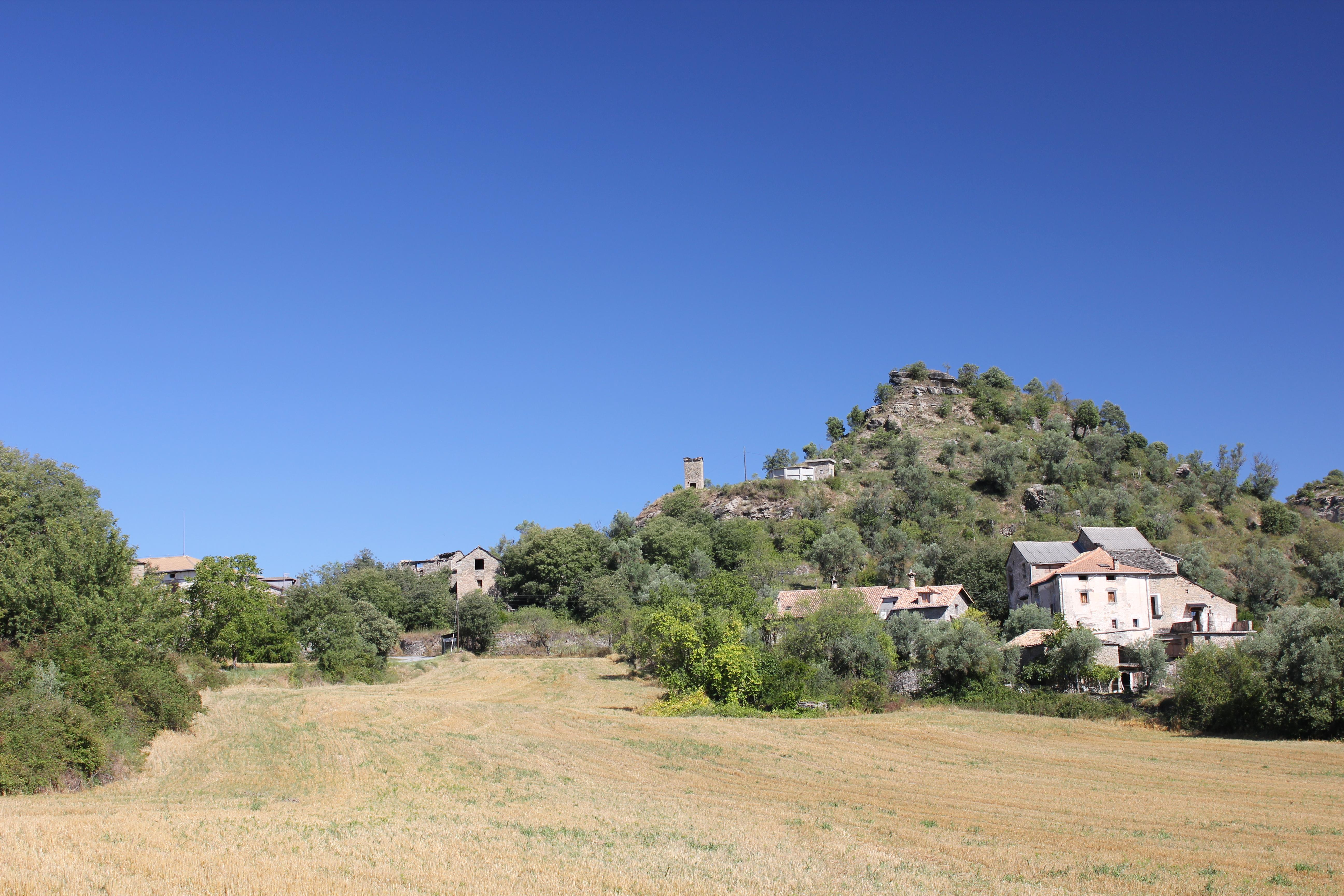 Aragonés: Envista parcial de Castillón de Sobrarbe.